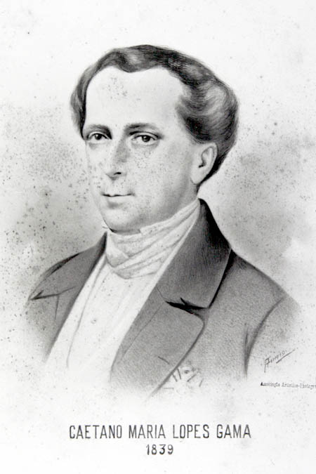 Caetano Maria Lopes Gama, o Visconde de Maranguape.